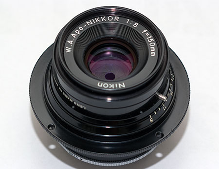 Wide Angle Apo-NIKKOR 150mm F8